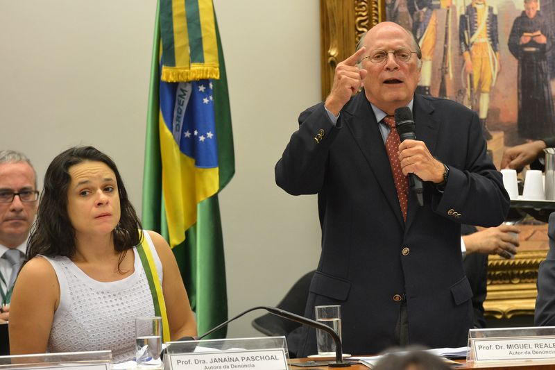 Comissão especial ouve autores do pedido de impeachment, Janaína Paschoal e Miguel Reale Jr